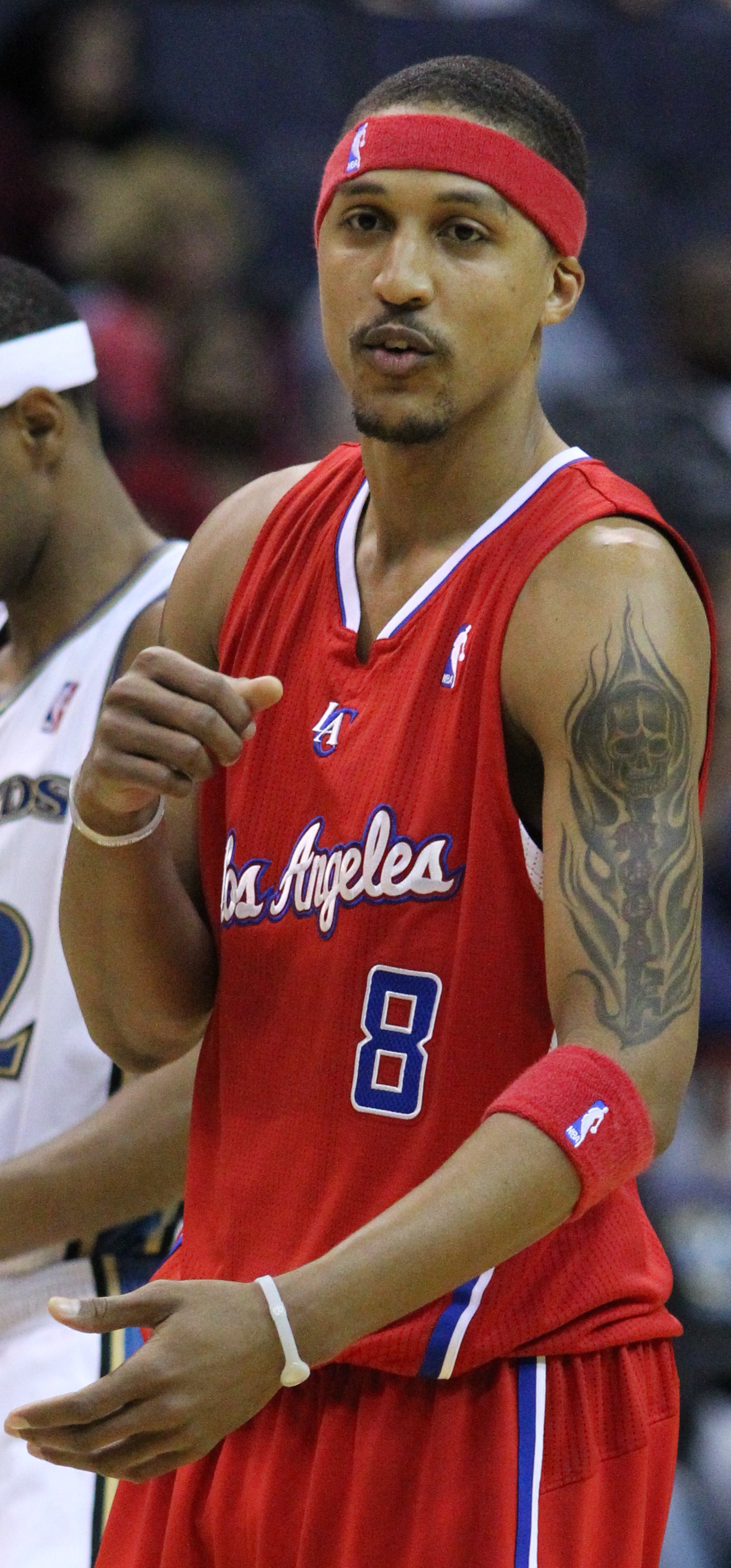 Wizards v/s Clippers 03/12/11